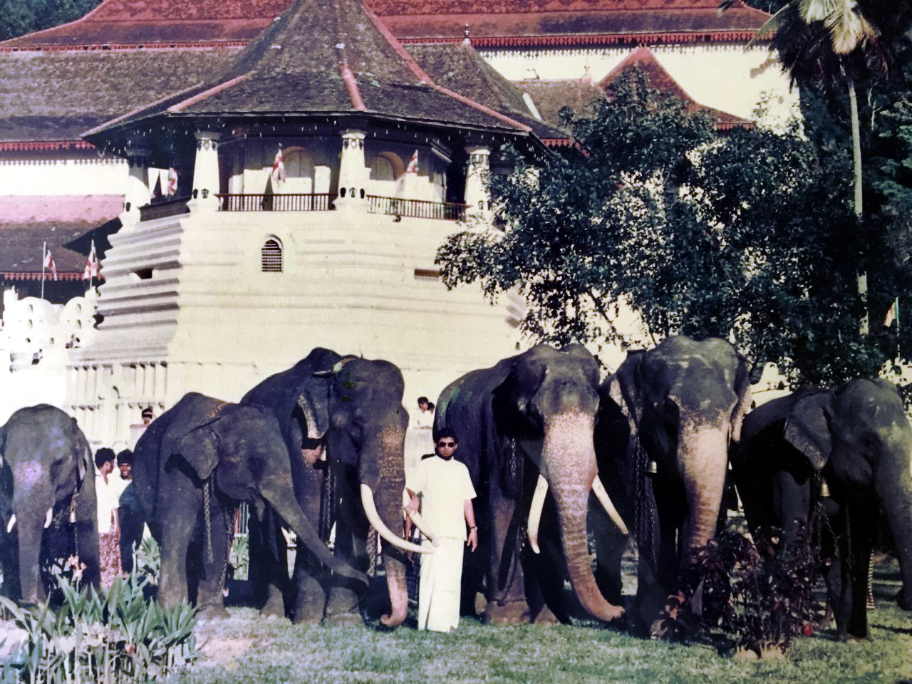 Photograph of Mr.Neranjan Wijeyeratne with the Sri Dalada Maligawa elephants - Raja,Skanda,Jaya Raja & a few more